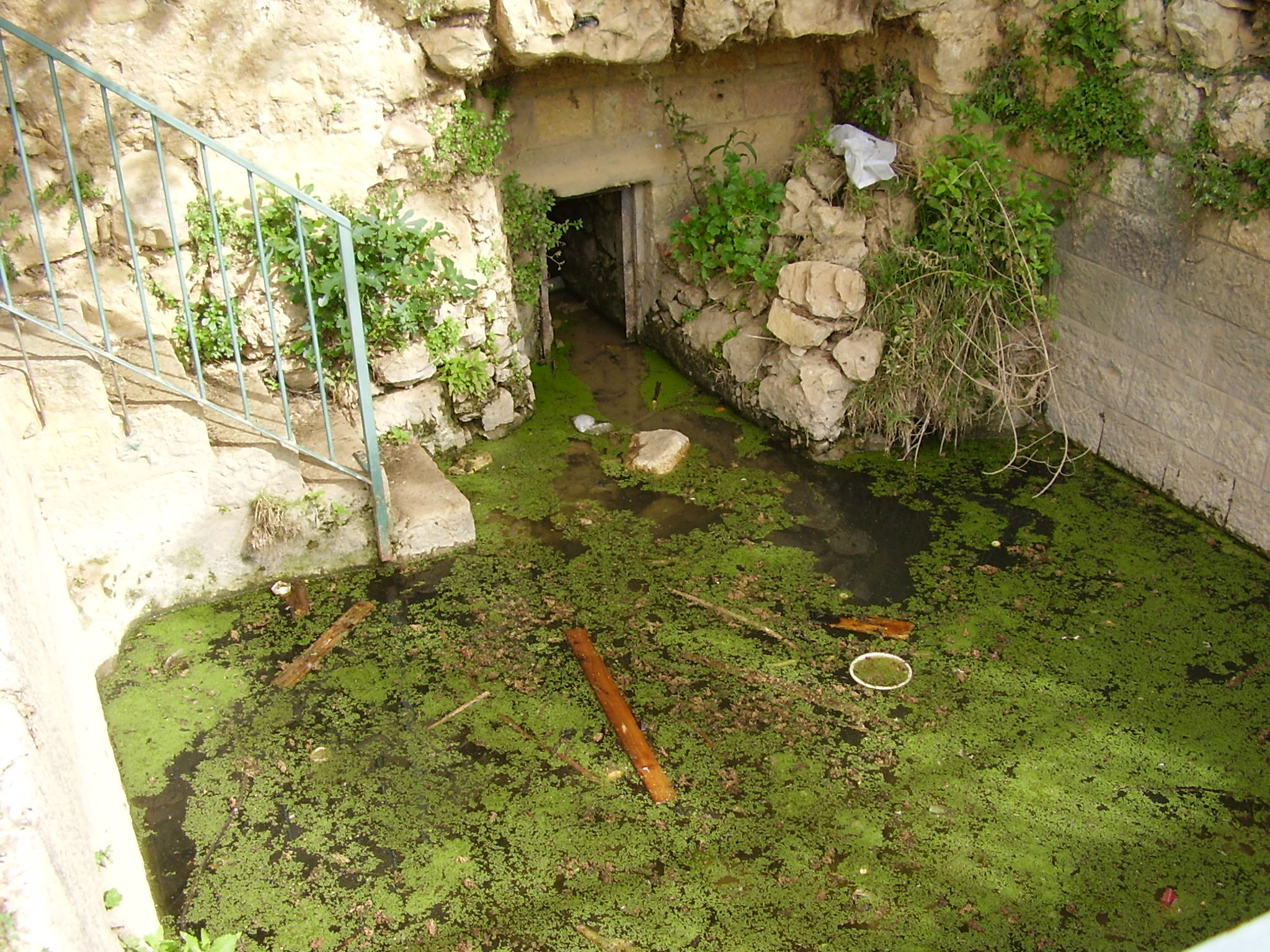 בריכת המעין המרכזי בעינות תלם נוצר על ידי משתמש:Avi1111